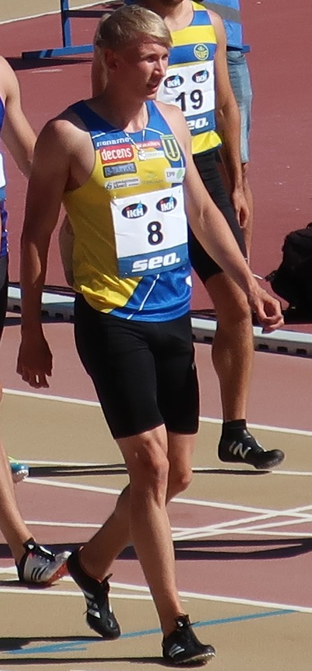 Samuli Samuelsson 200 metrin juoksun alkueränsä jälkeen Kalevan kisoissa 2020.